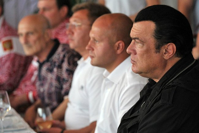 На встрече Владимира Путина с олимпийской сборной России по дзюдо присутствовал актёр Стивен Сигал